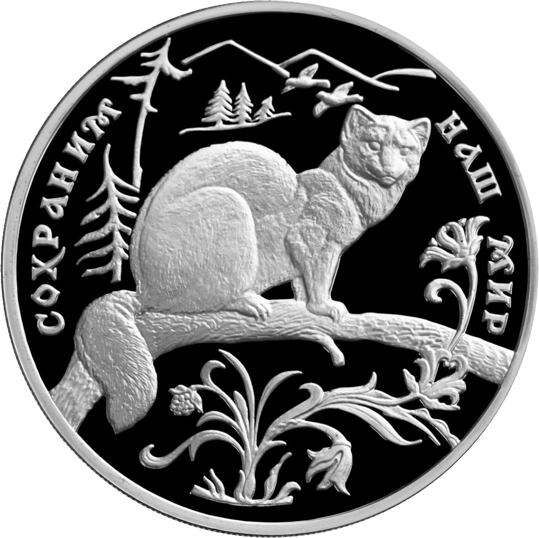 Монета Банка России — Серия: «Сохраним наш мир», Соболь, 3 рубля, реверс.